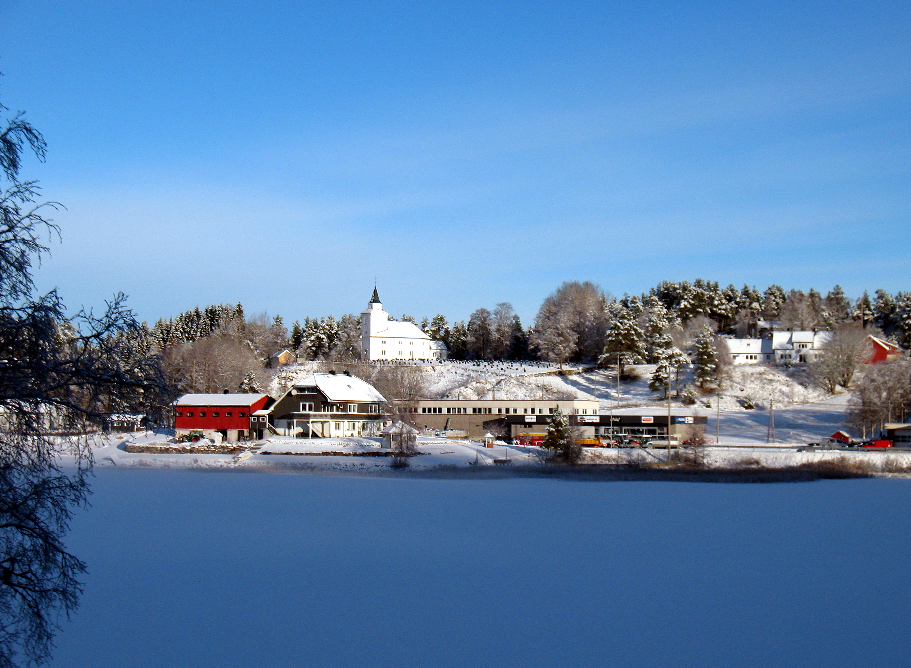 Hægeland kirke og grenden Hægeland i Vennesla kommune, Vest-Agder. Hægelandsvannet og Suggeheia. Fra syd.